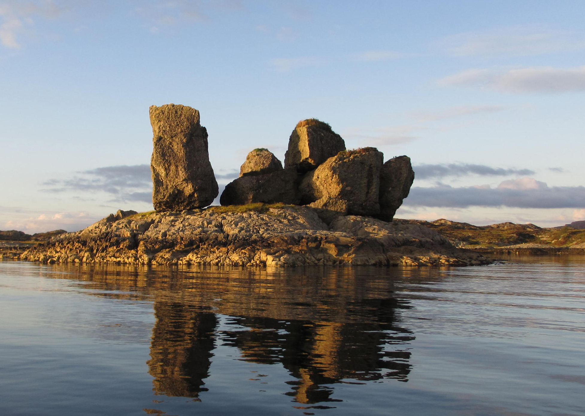 Lågøystolane, særmerkte steinformasjonar på Lågøy i Solund kommune